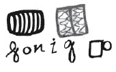 Livre des sauvages, «honig» in German means «honey»